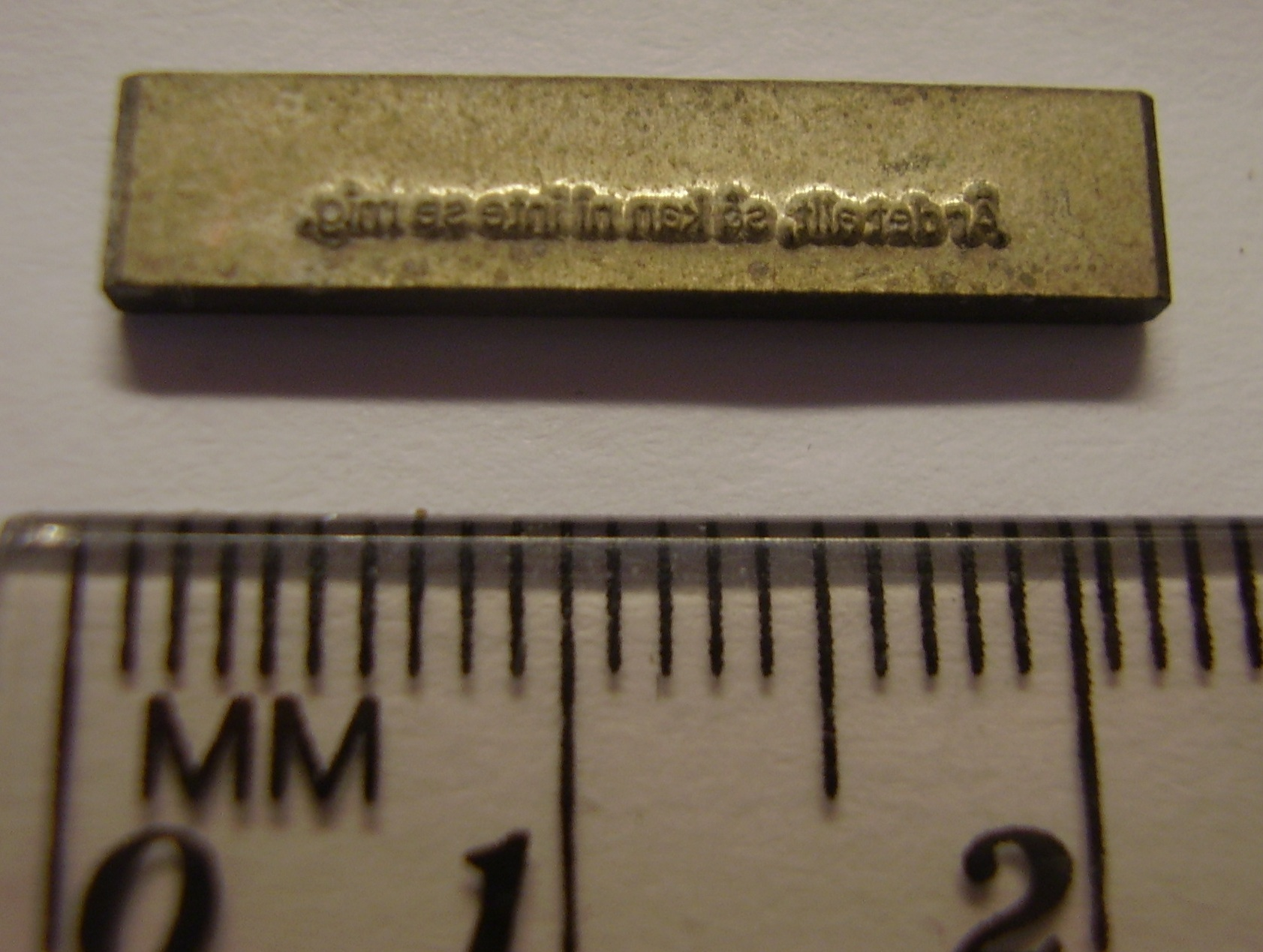 Textningskliché för 35mm biograffilm.